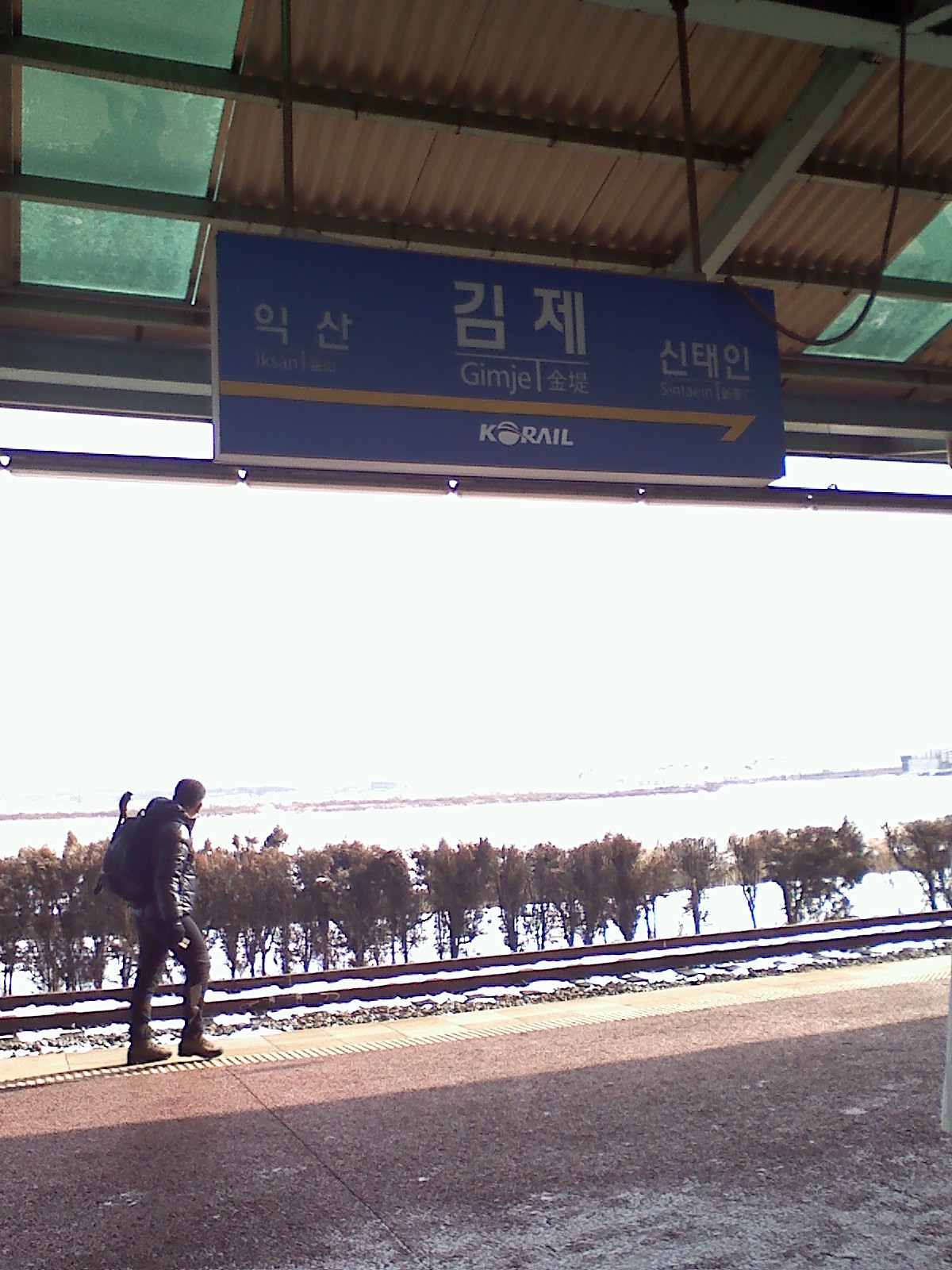 제가 직접 촬영한 사진입니다.